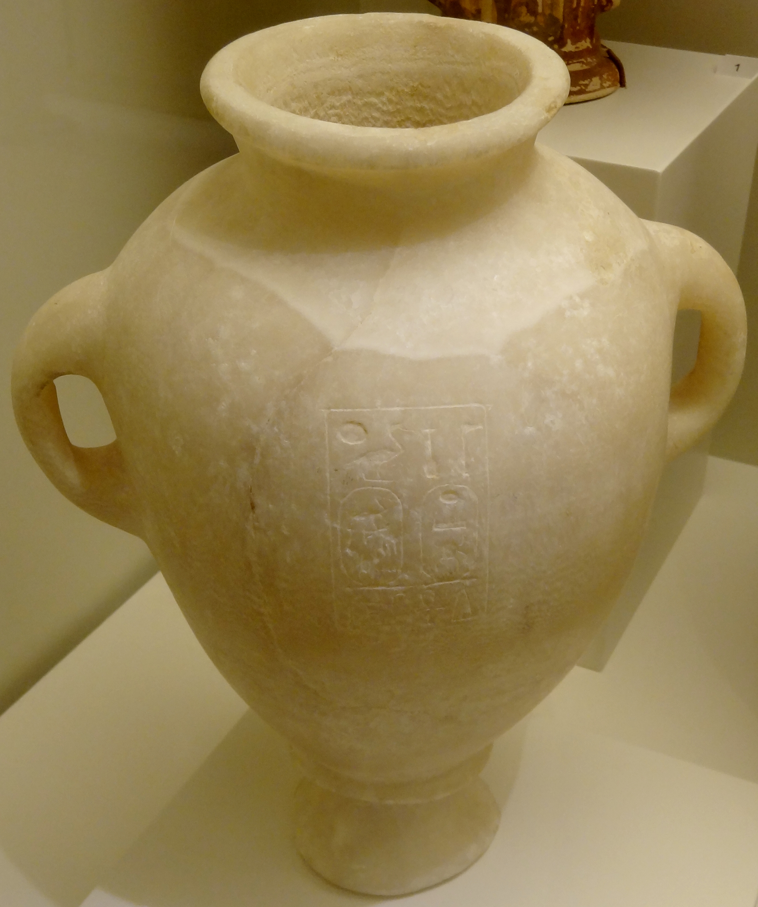 Importierte ägyptische Alabasteramphore aus der 18. Dynastie mit eingeschnittener Hieroglypheninschrift Thutmosis III. (1479/69–1436/25 v. Chr.): „Der vollkommene Gott Men-cheper-Re (Bleibend ist die Erscheinung des Re), Sohn des Re Thutmosis nefer-cheperu (Vollkommen an Erscheinungen), dem Leben gegeben ist ewiglich.“ (1400–1350 v. Chr.) aus Katsambas, ausgestellt im Archäologischen Museum Iraklio, Kreta, Griechenland